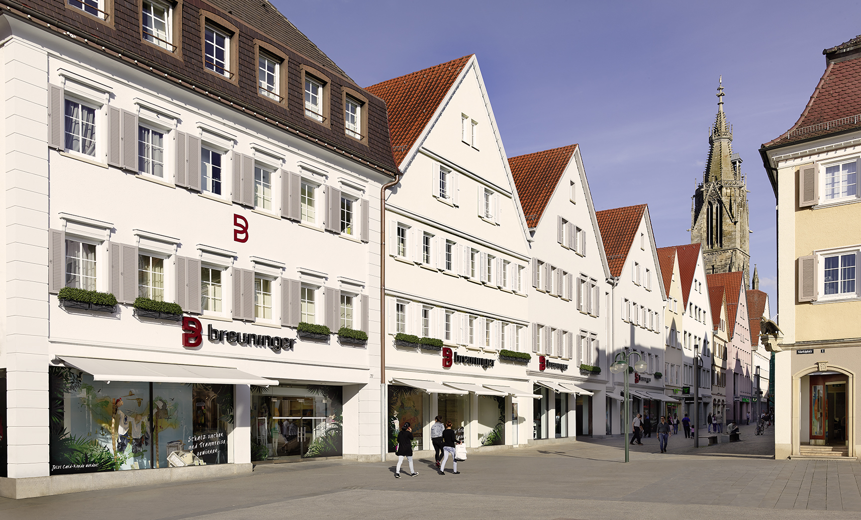 ТД "Бройнингер",г.Ройтлинген